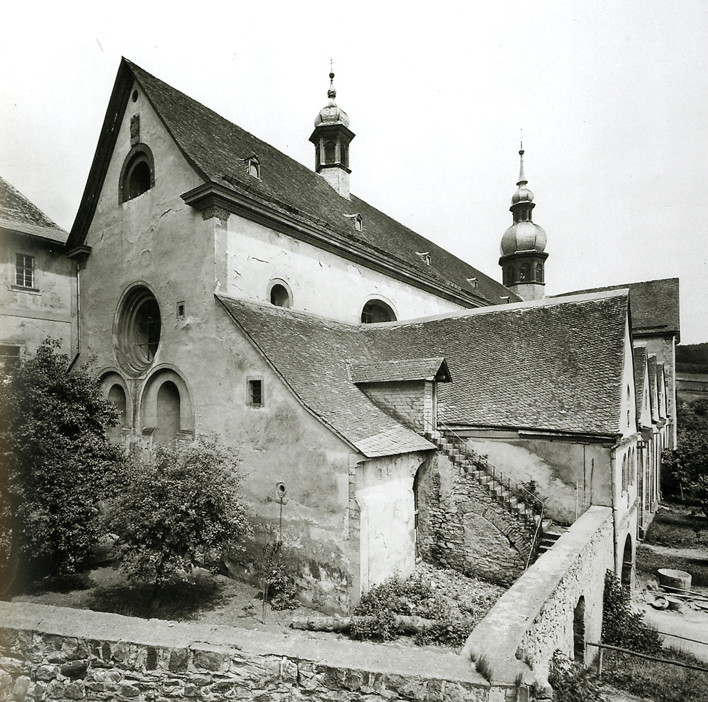 Die Kirche des Klosters Eberbach im Rheingau, 1885. Ansicht der Abteikirche von Südwesten mit jüngeren Anbauten.